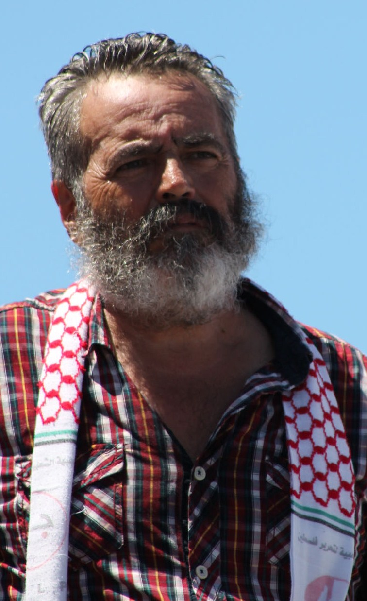 Portrait de Juan Manuel Sanchez Gordillo, maire de Marinelada.